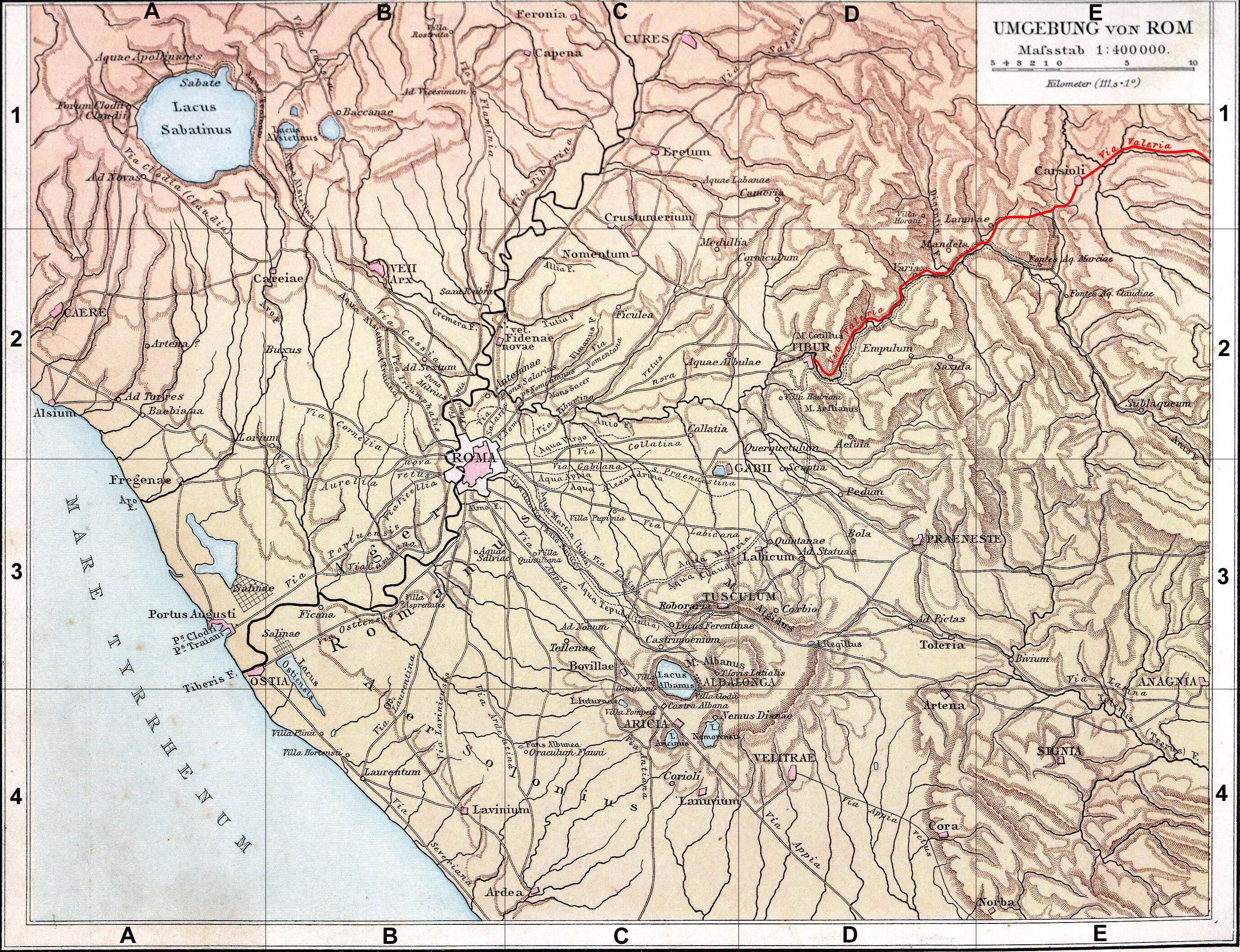 Fond de carte de 1886 (G. Droysens Allgemeiner Historischer Handatlas), libre de droit (Image:Rom_Umgebung.jpg), avec la voie Valérienne en rouge.